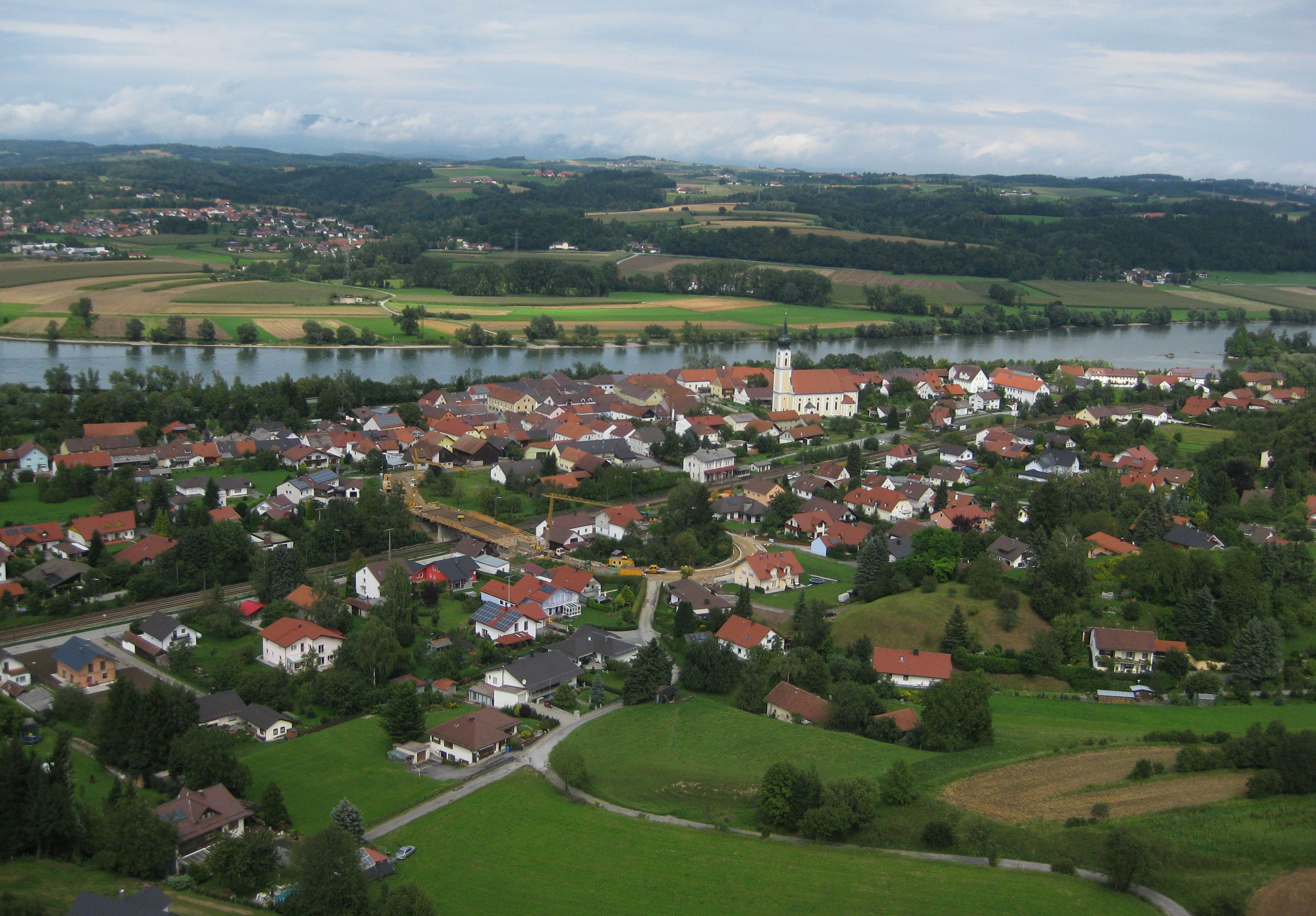 Luftansicht von Pleinting (Aufnahme mit Modellflieger).